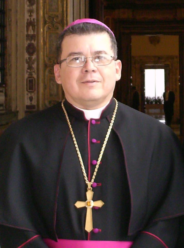 ARZOBISPO METROPOLITANO DE CALABOZO